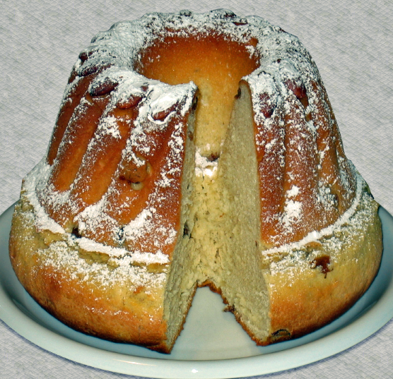 Photographie d'un kouglof (spécialité alsacienne)